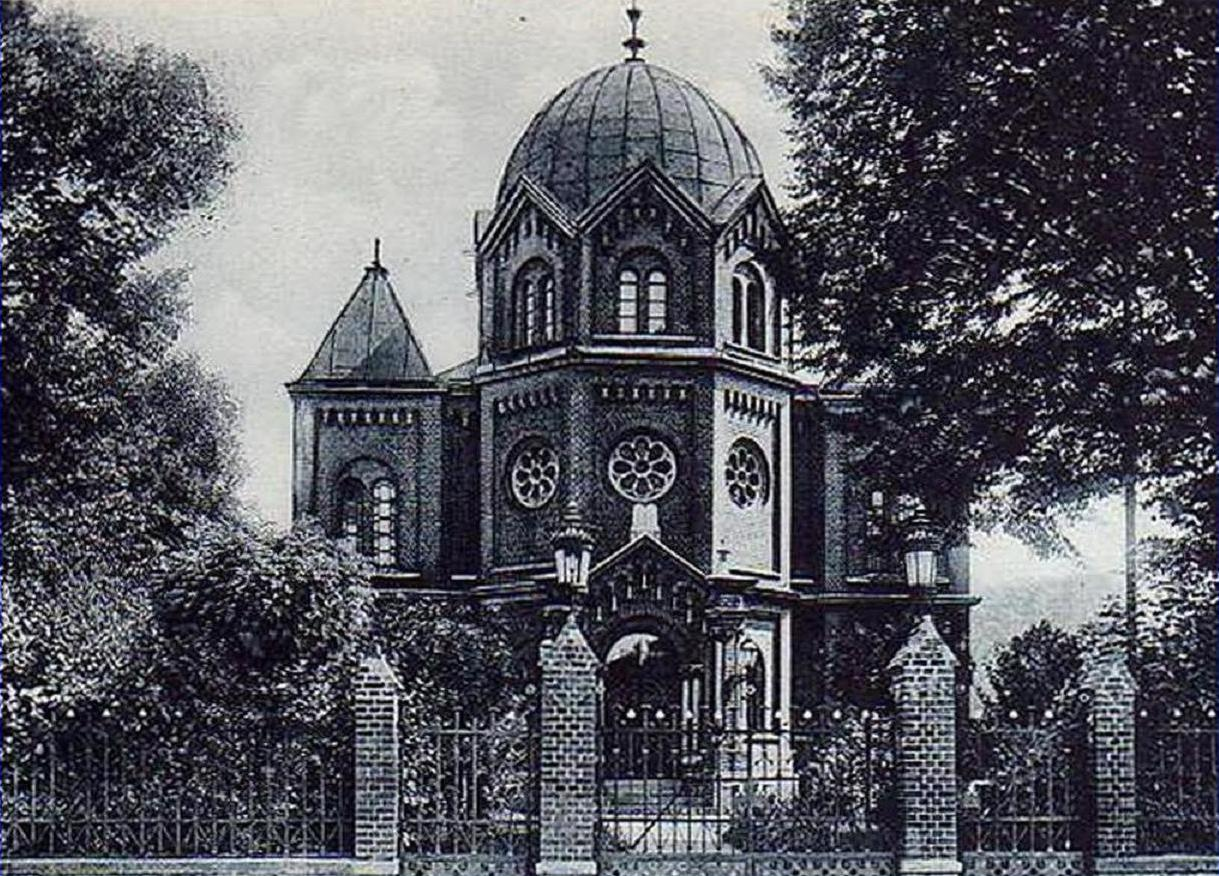 Zdjęcie synagogi w Koźlu z 1920 r.